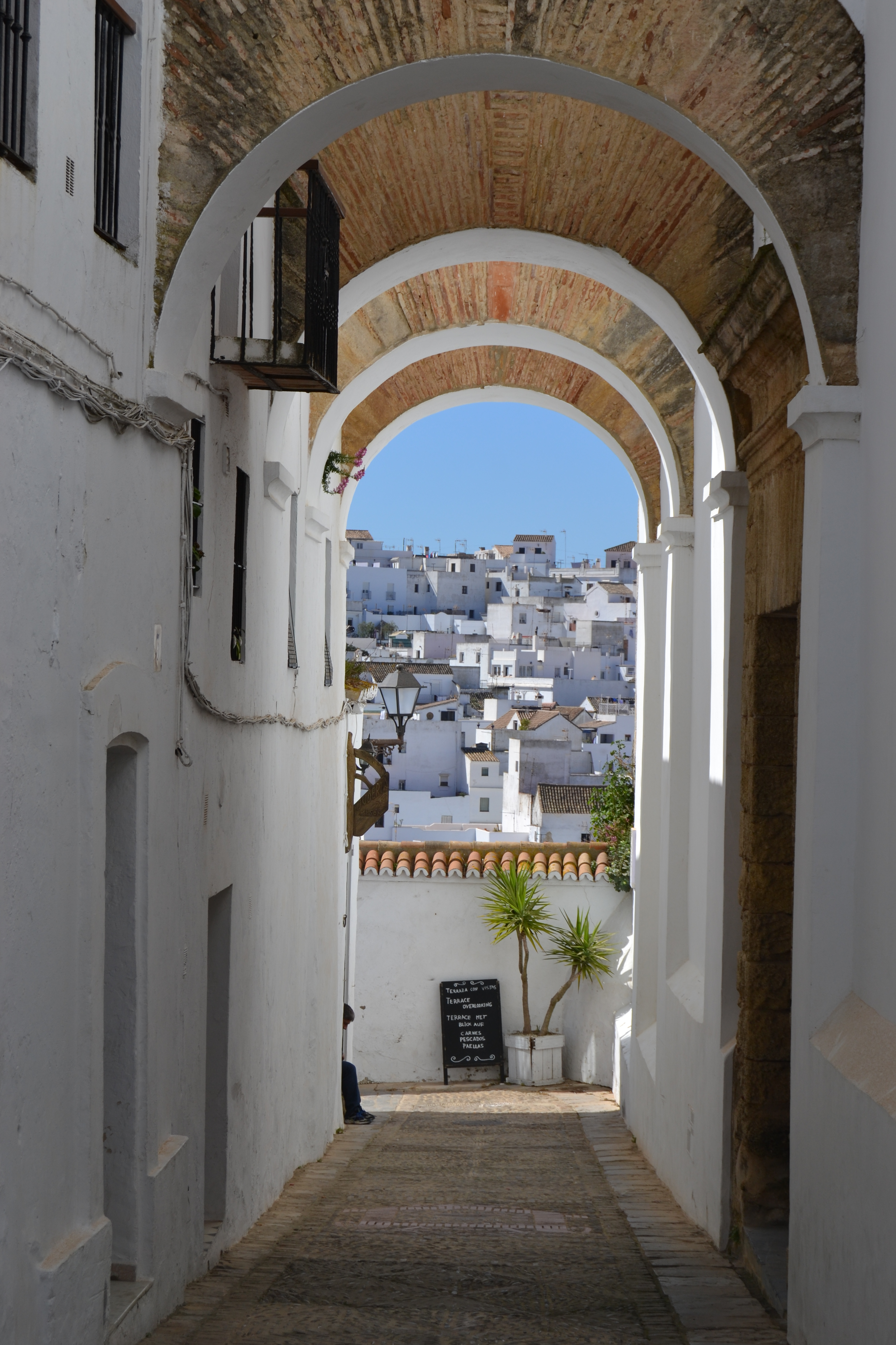 Vejer de la Frontera, provincia de Cádiz, Andalucía, España. Marzo de 2017.